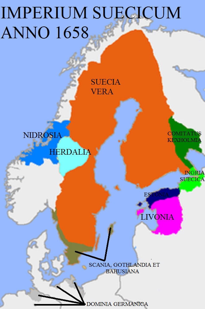 Imperium Suecicum anno 1658